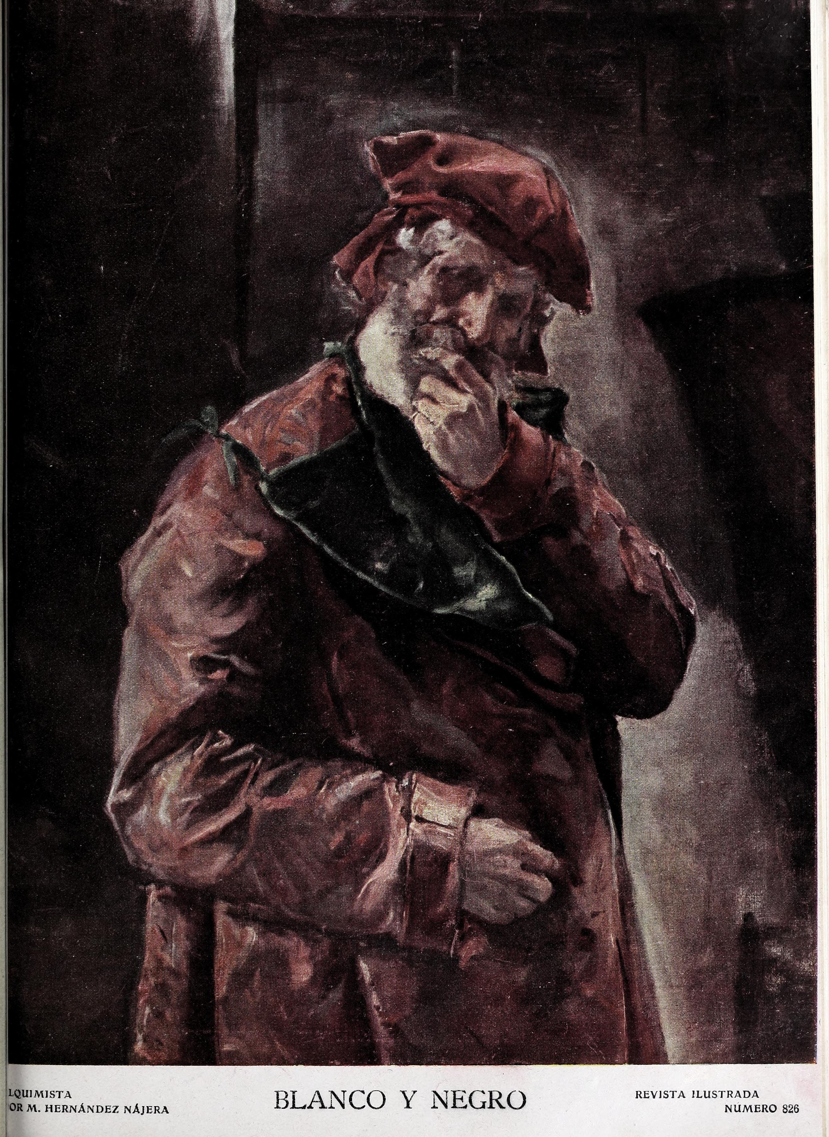 Alquimista.